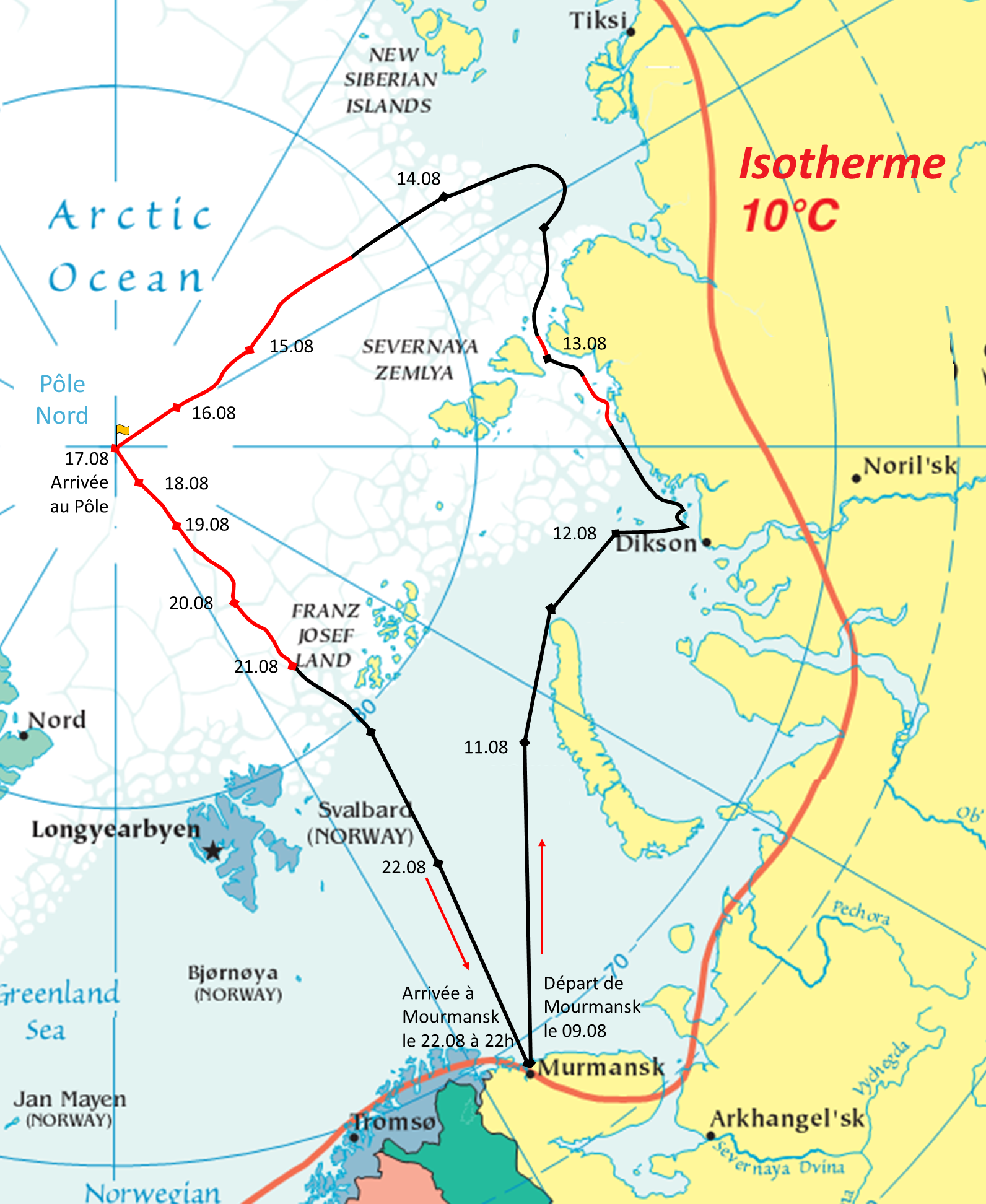 Trajet approximatif de l'Arktika jusqu'au Pôle Nord en 1977, à partir de la carte et du tracé original